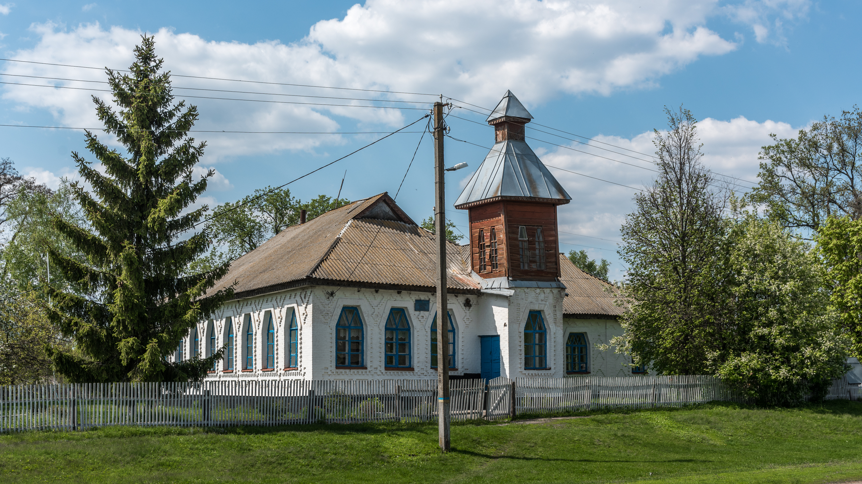 Двокомплектна земська школа в селі Богодарівка Чорнухинського району Полтавської області. Стиль - український архітектурний модерн. Архітектор Опанас Сластьон.